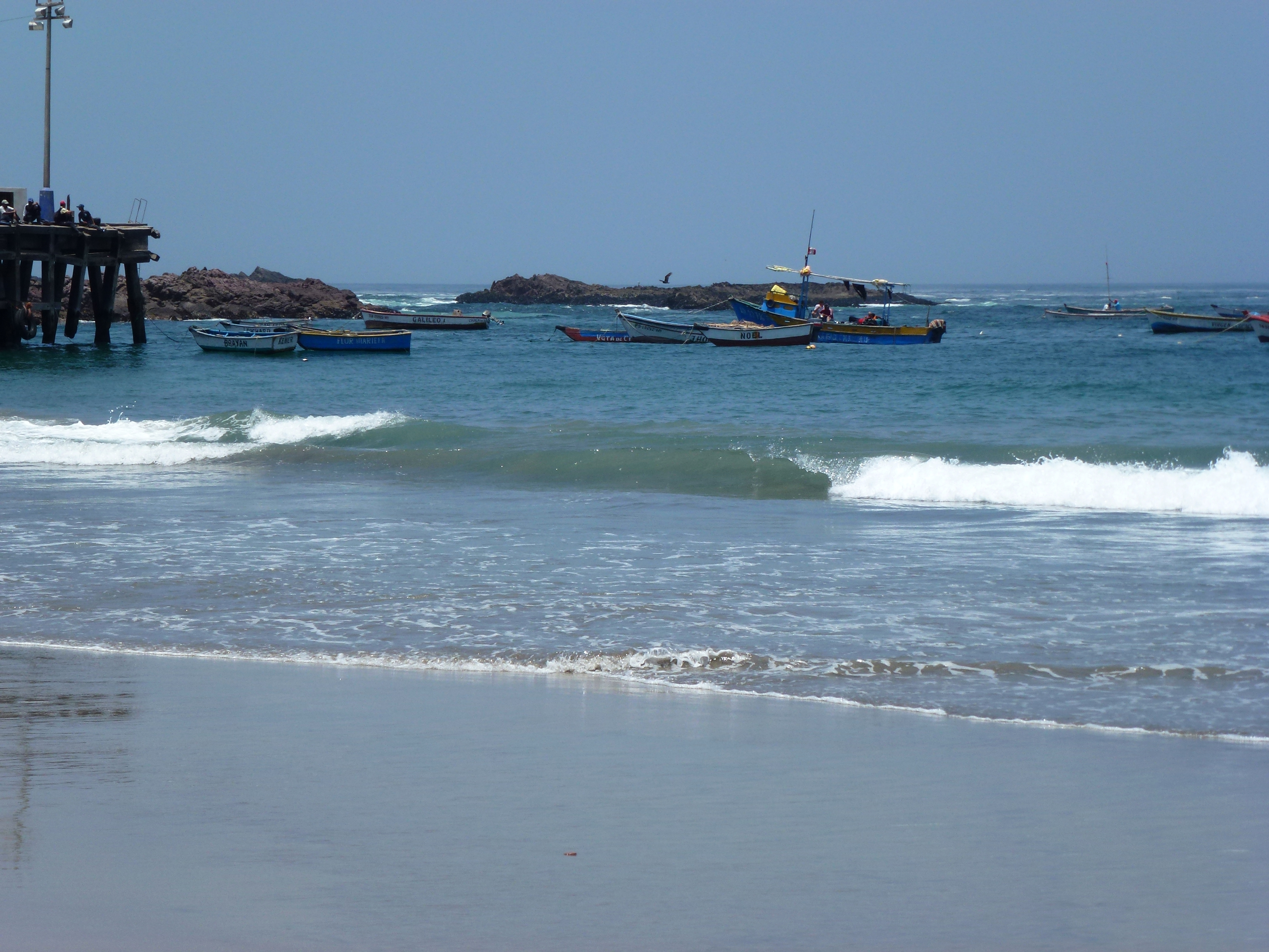 Playa de Chala District de Chala Provincie de Caravelí.-Perú.